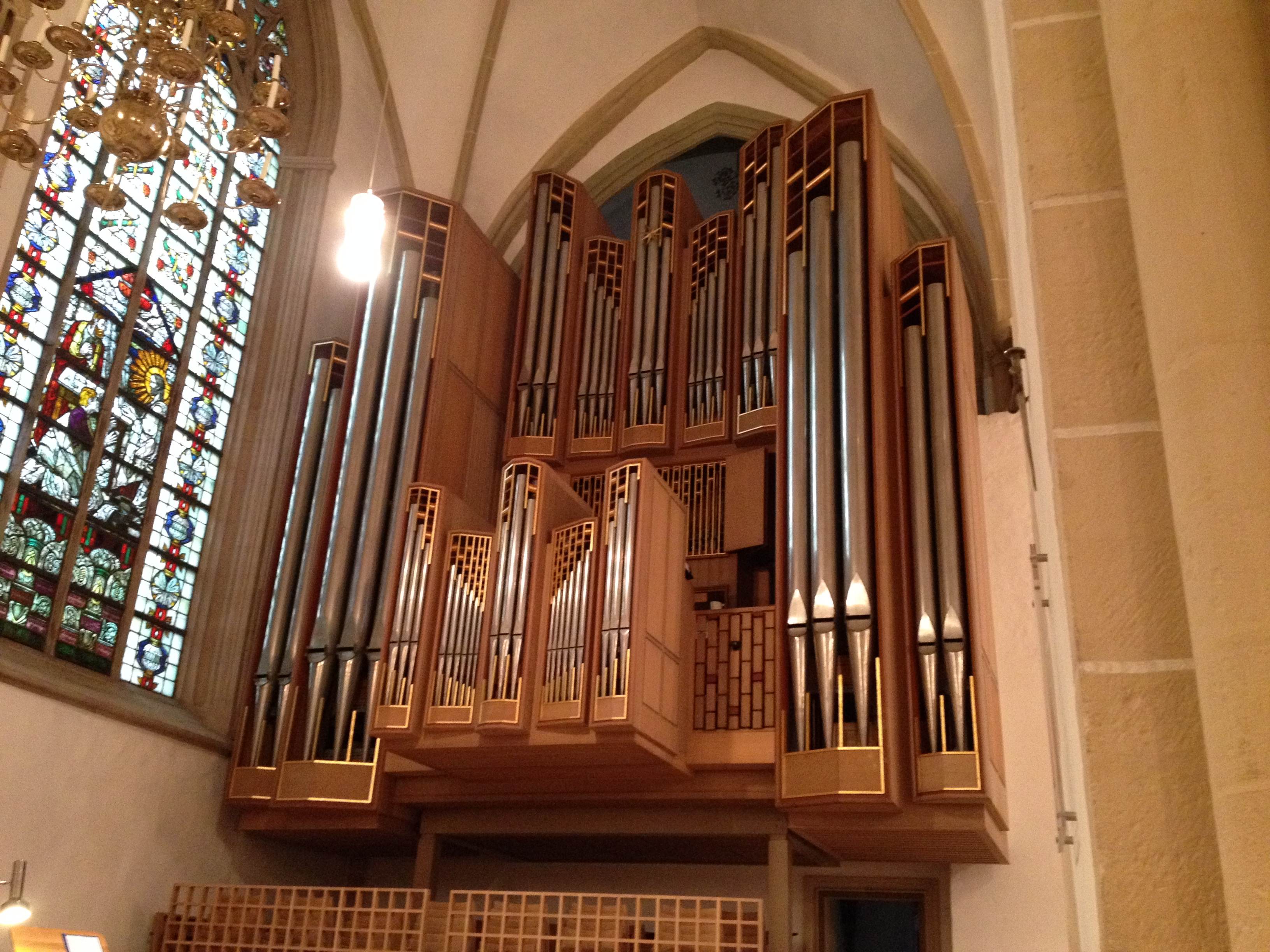 Orgel der St. Nicolai Kirche in Lemgo